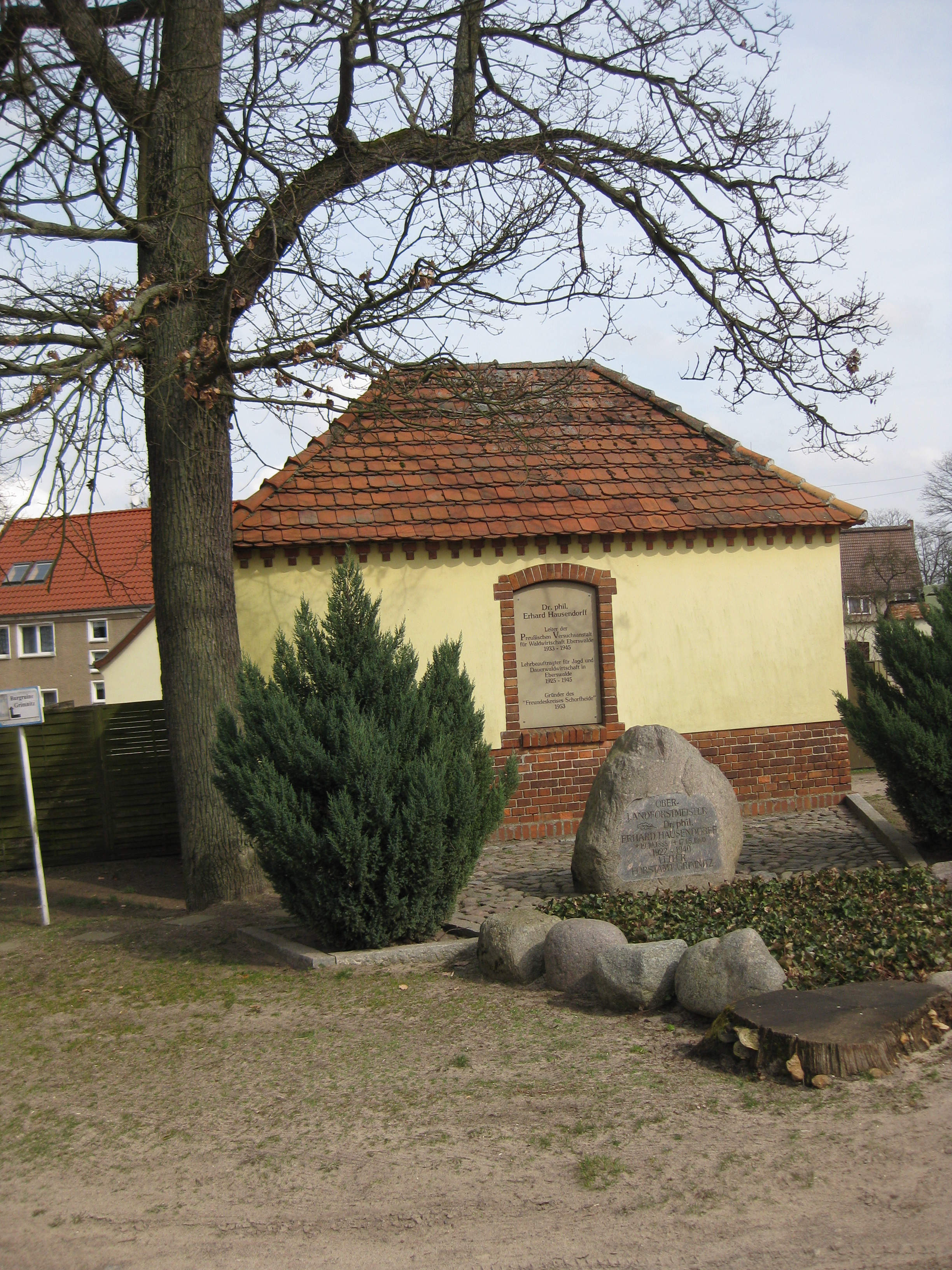 Ehem. Feuerwehrhäuschen in Grimnitz, Stadt Joachimsthal (Barnim), nunmehr Gedenkstätte für den Forstmann Erhard Hausendorff